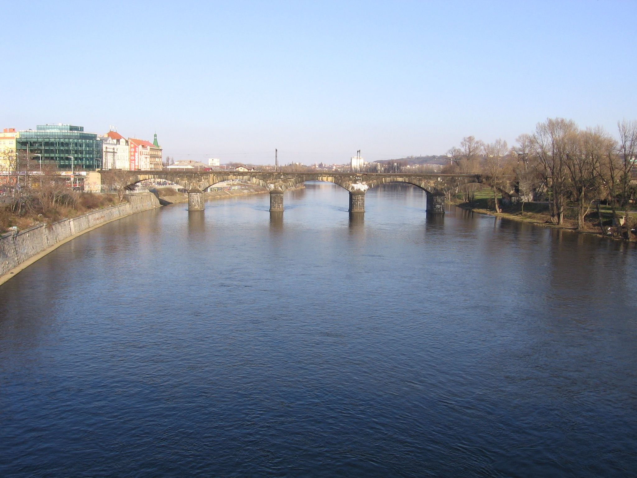 Negrelliho viadukt nad levým ramenem Vltavy